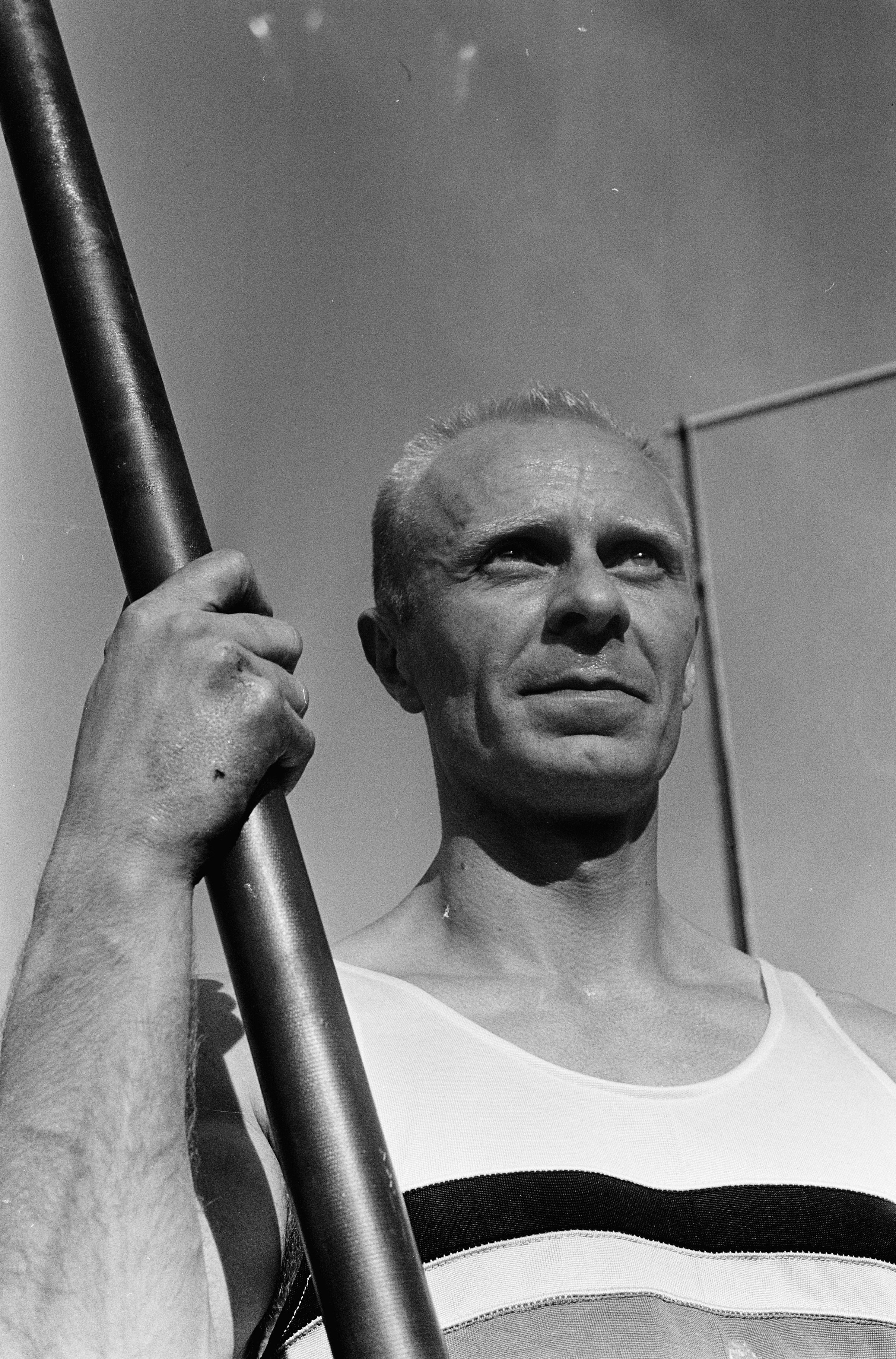 Collectie / Archief : Fotocollectie Anefo Reportage / Serie : [ onbekend ] Beschrijving : Internationale atletiekwedstrijden Benelux tegen Engeland Gent, de Belg Coppejans (kop) Datum : 7 juni 1964 Locatie : Gent Trefwoorden : KOPPEN, atletiekwedstrijden Persoonsnaam : coppejans Fotograaf : Pot, Harry / Anefo Auteursrechthebbende : Nationaal Archief Materiaalsoort : Negatief (zwart/wit) Nummer archiefinventaris : bekijk toegang 2.24.01.05 Bestanddeelnummer : 916-5195